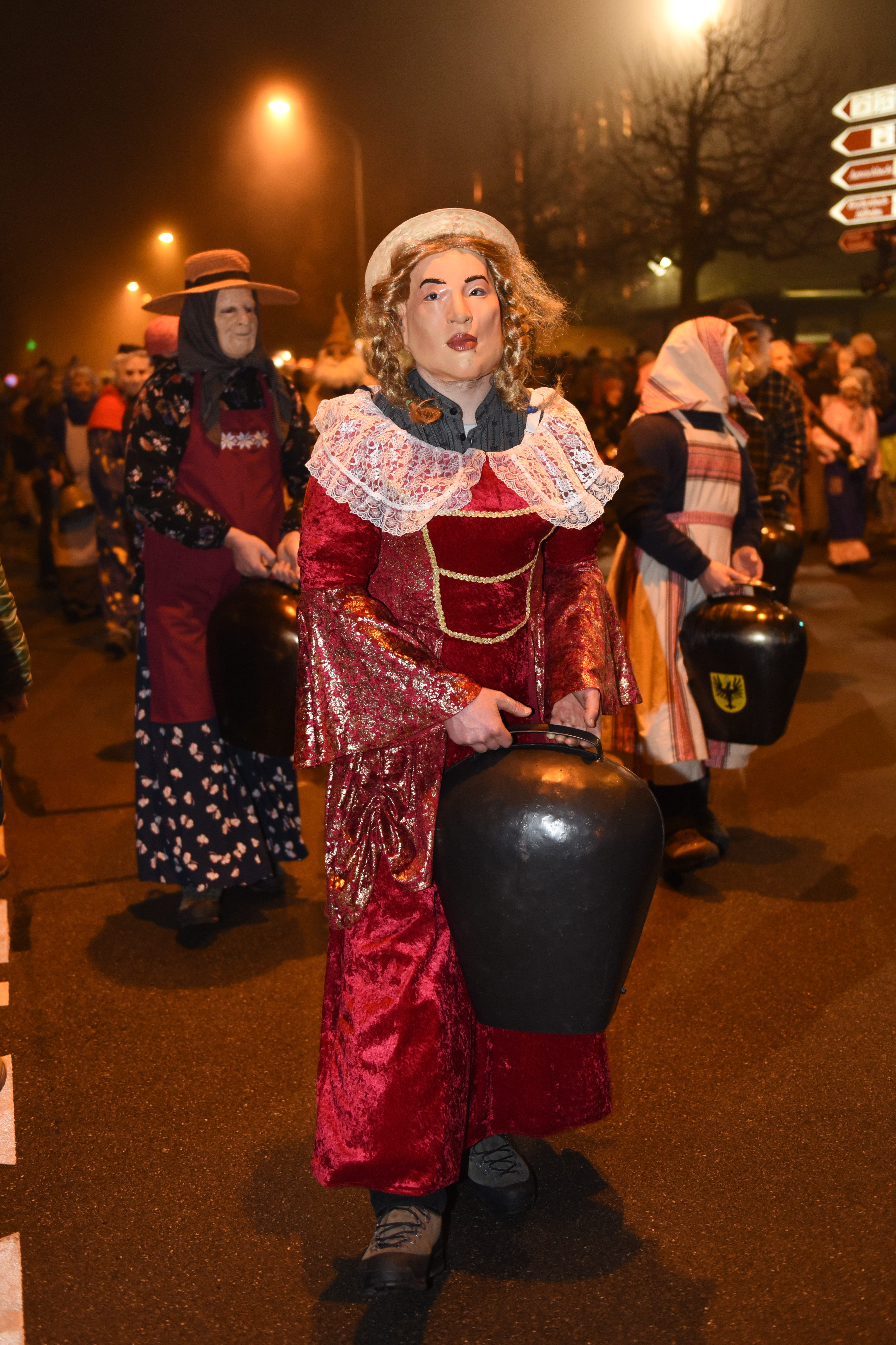 Foto by Theo van Dommelen